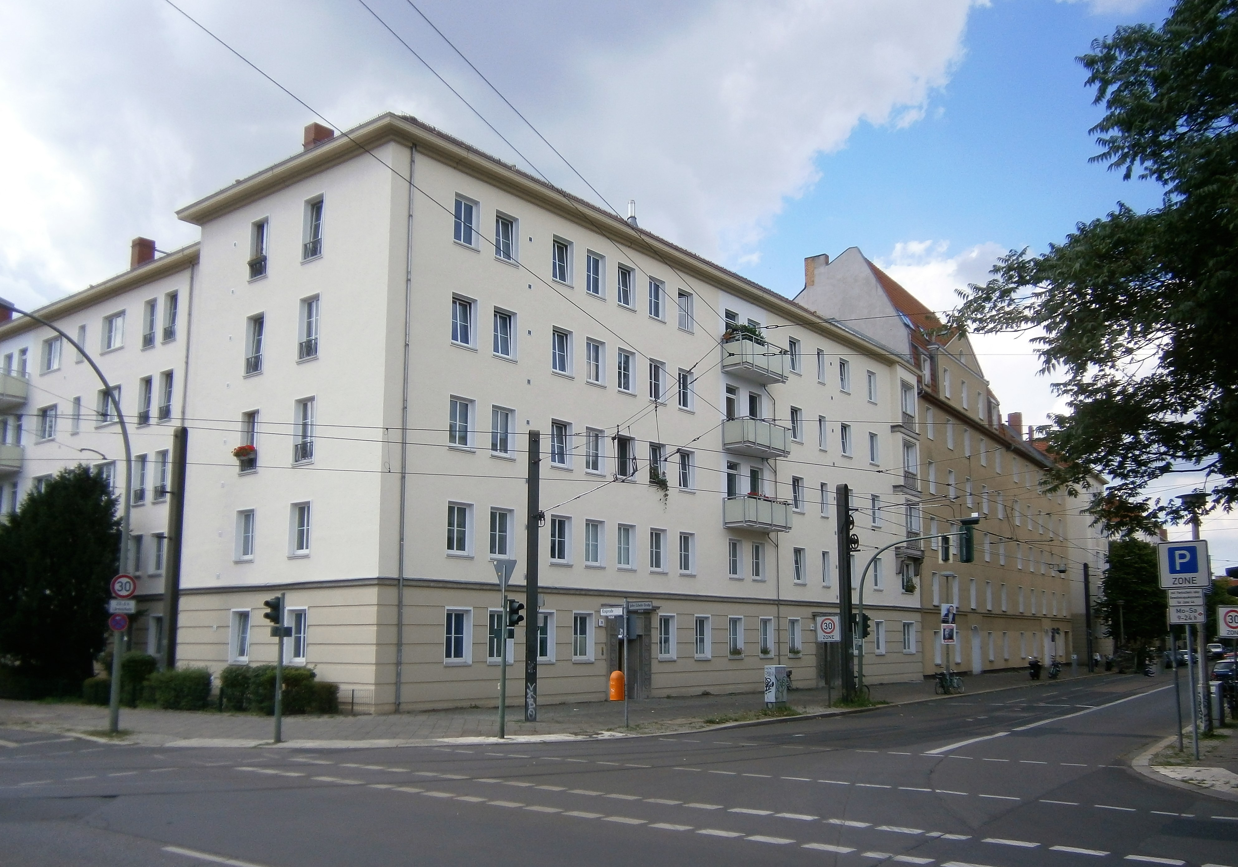 Die Grüne Stadt ist ein 1938/1939 erbautes Wohnensemble und die entsprechende Ortslage im Berliner Ortsteil Prenzlauer Berg des Bezirks Pankow. Blick auf die Ecke Kniprodestraße/ John-Schehr-Straße mit den Bauten der 1950er Jahre, die statt der vorherigen Mietskasernen an der Danziger Straße nach deren Zerstörung durch Bomben im Zweiten Weltkrieg entstanden.